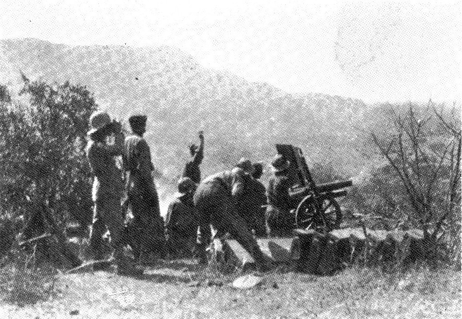 Batteria_della_180ª_Legione